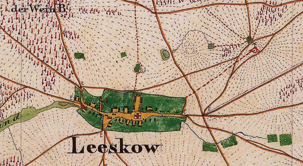 Leeskow, Ortsteil von Jamlitz, Lkr. Dahme-Spreewald, Brandenburg, Deutschland, Leeskow auf dem Urmesstischblatt von 1844, Ausschnitt